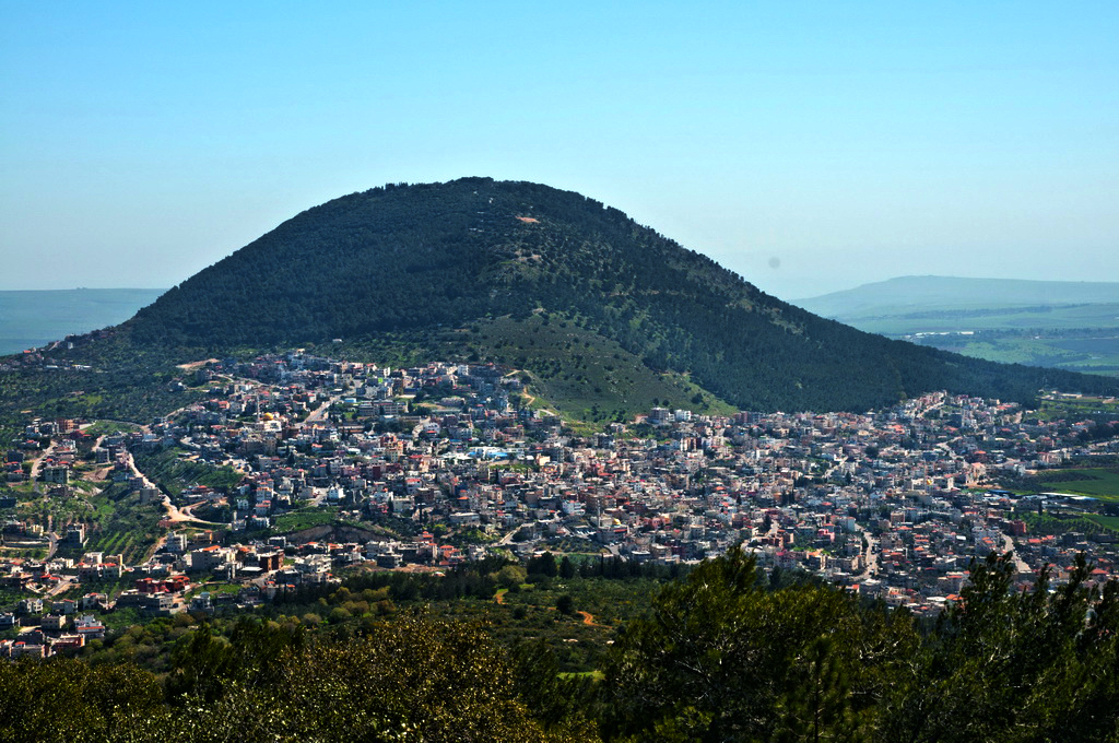 הַר תָּבוֹר הוא פסגה בולטת הממוקמת מדרום לרכס הרי נצרת ומצפון לעמק יזרעאל, והוא אחד ההרים הגבוהים בגליל התחתון. פסגתו נמצאת בגובה 562 מטר מעל פני הים והוא מתנשא לגובה של כ-400 מטרים מעל סביבתו. הפסגה בולטת ונראית גם לצופים בה ממקומות מרוחקים ברחבי הגליל והגולן. במבט מכפר תבור, ממזרח למערב, הפסגה נראית מחודדת מאד. במבט מדרום לצפון, מכיוון עפולה, הפסגה נראית מעוגלת ומתונה.